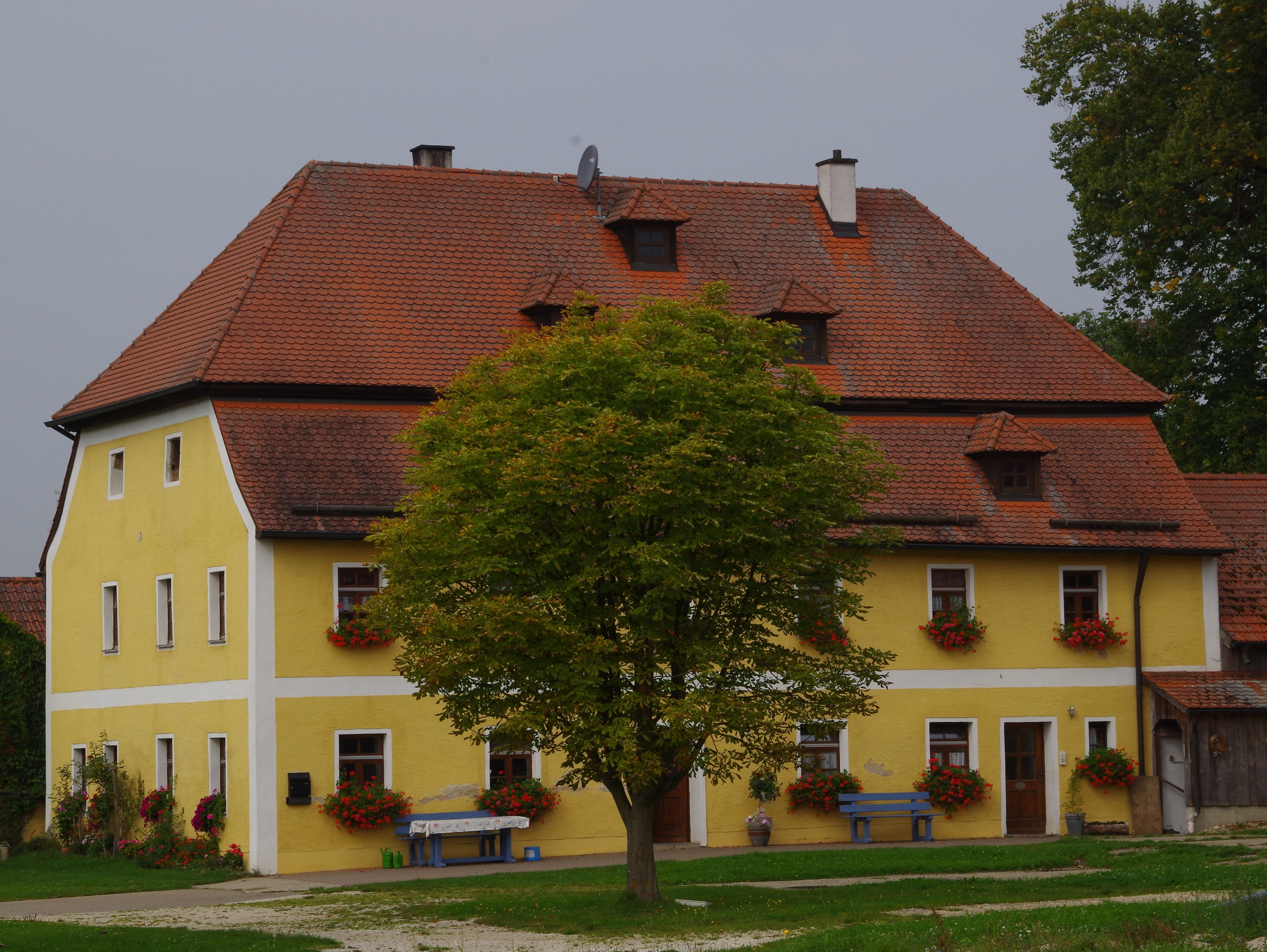 Gutshaus Pettenhof - Brunn